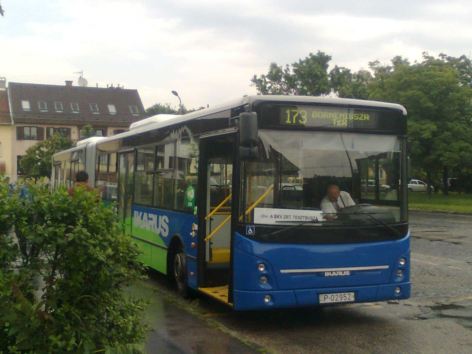 Ikarus V187 típusú autóbusz Budapesten